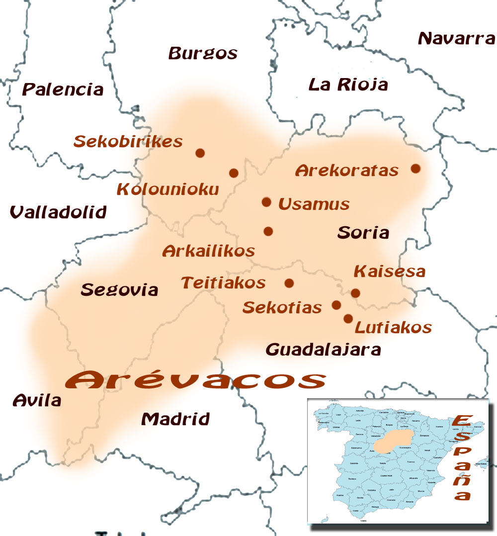 Zona aproximada de los Arevacos en Iberia.